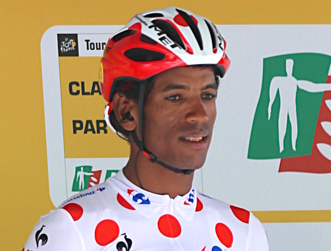 Daniel Teklehaimanot lors du départ de la 8e étape du Tour de France 2015 à Rennes.